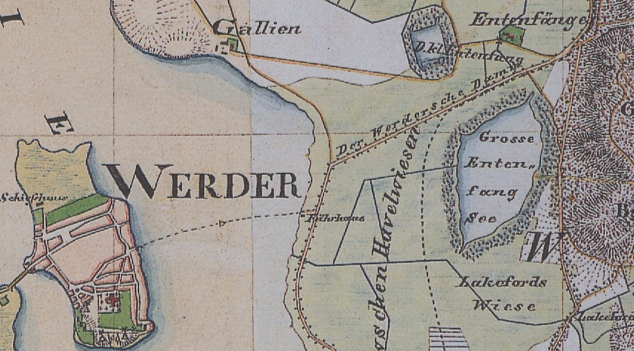 Werder (Havel), Lkr. Potsdam-Mittelmark, Gallin und Entenfang (ehemalige Wohnplätze) auf dem Urmesstischblatt 3643 Werder (Havel) von 1839